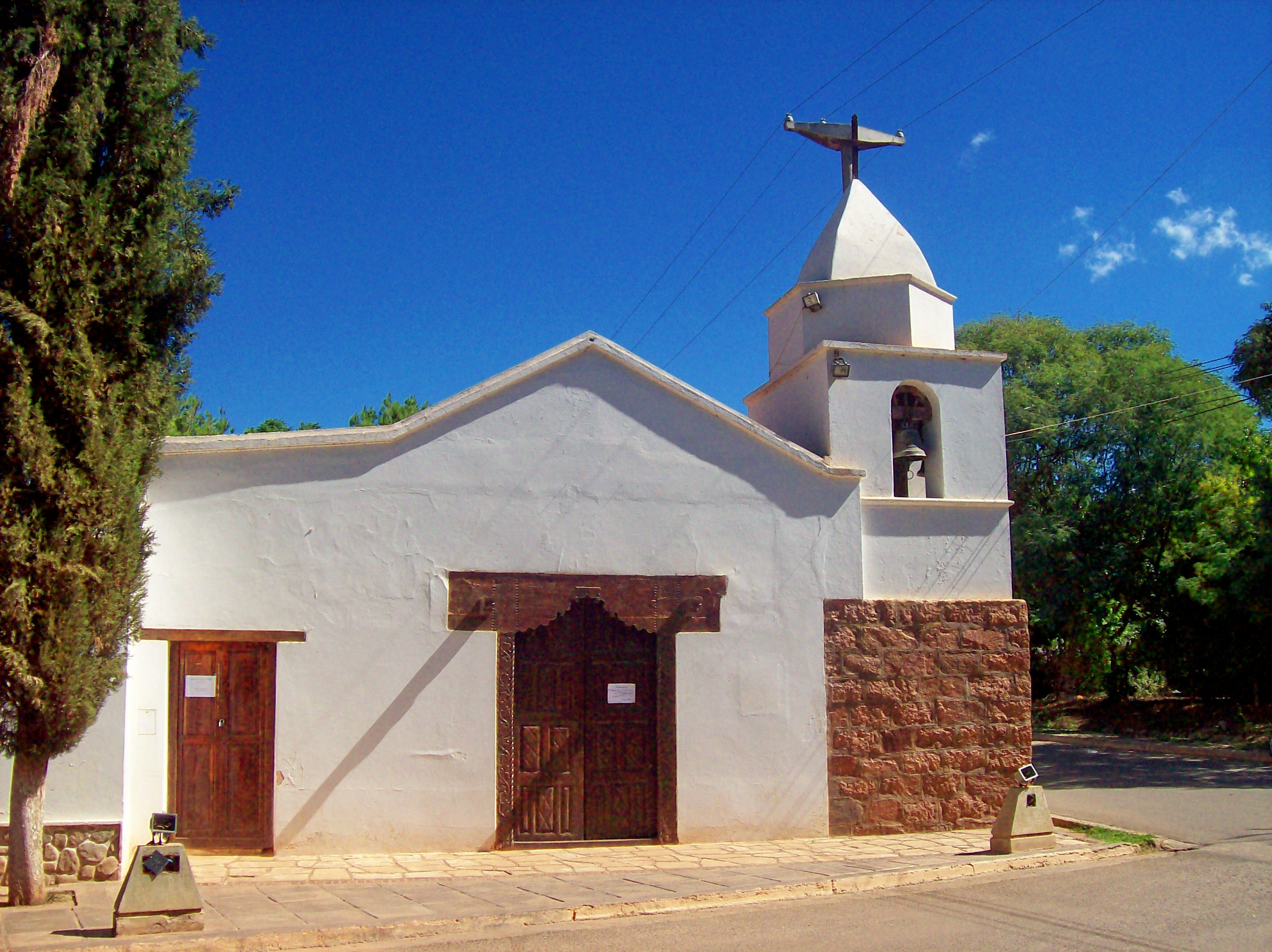 Fachada de la Capilla de Santa Clara de Asís, también conocida como capilla de Los Sarmientos, (por ser la localidad en la que se encuentra), en la provincia argentina de La Rioja.